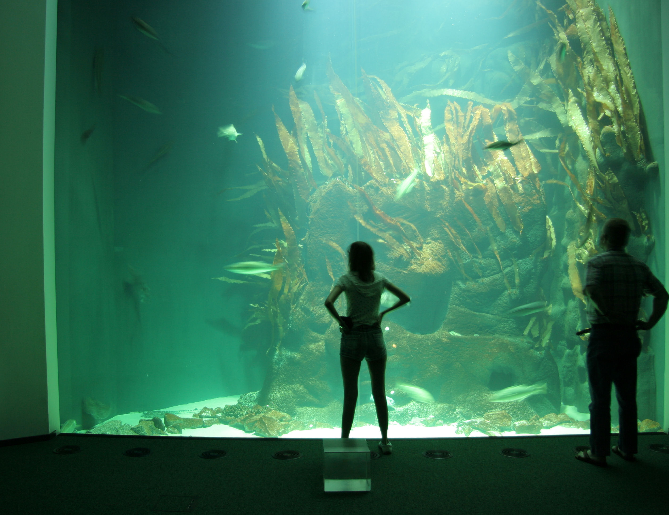 Neues Seewasseraquarium mit ca. 250.000 Litern Inhalt und einer 6 mal 6 Meter messenden Panoramascheibe im Multimar Wattforum Tönning